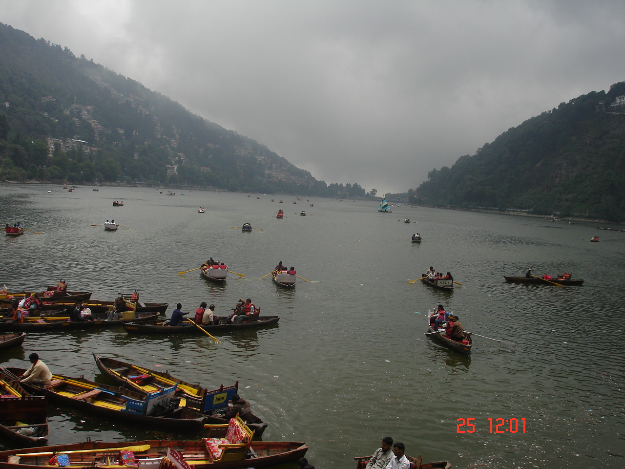 നൈനതാളിലെ സുന്ധര തടാകമായ തല്ലിതൾ